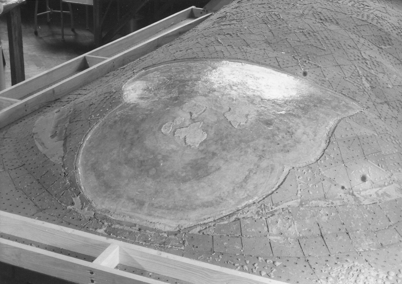 Prace konserwatorskie przy malowidłach z Faras w Muzeum Narodowym w Warszawie. Prace przy odwrociu malowidła niszy z przedstawieniem Matki Boskiej z Dzieciątkiem.